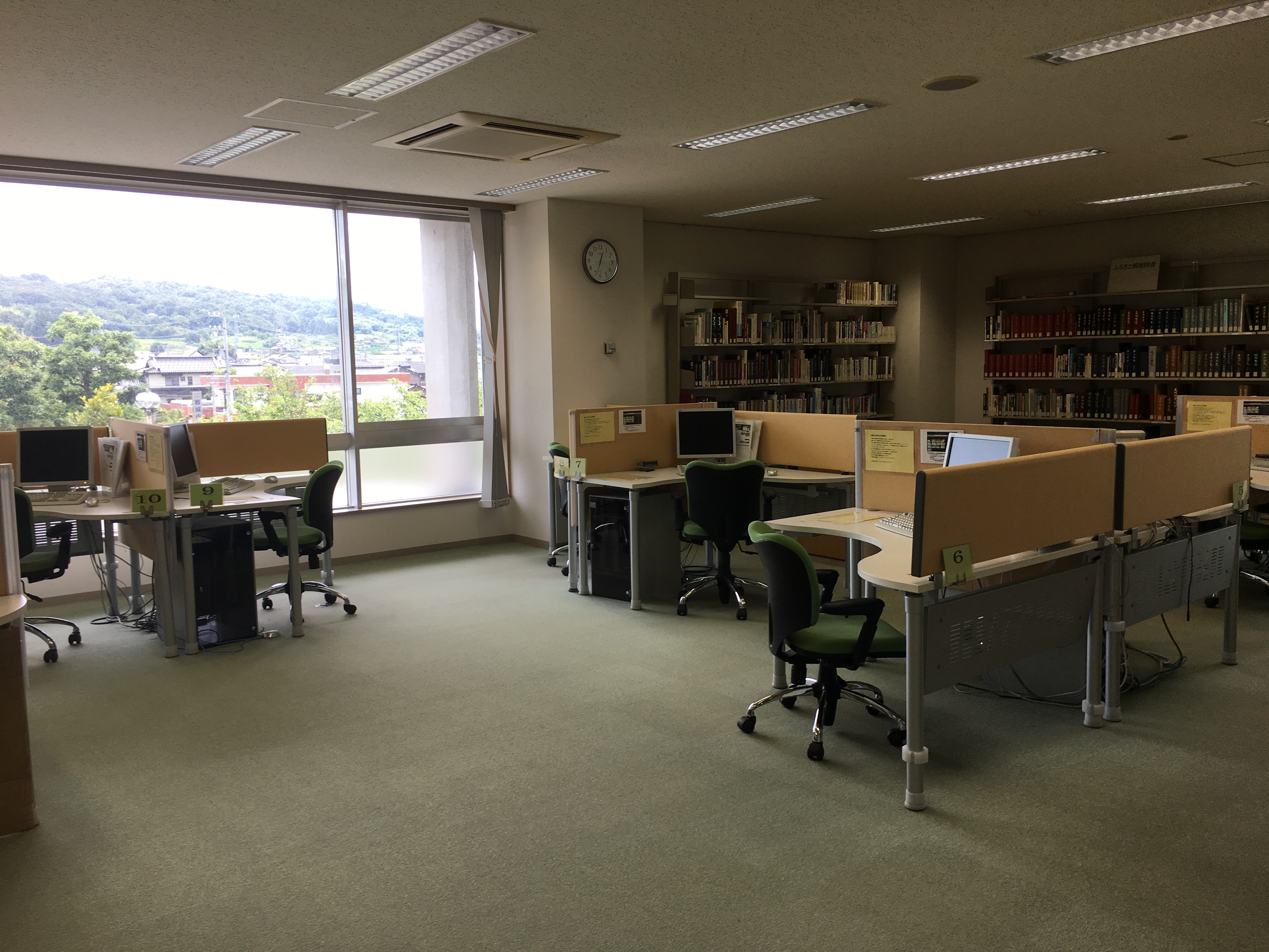 富山県立図書館情報プラザ